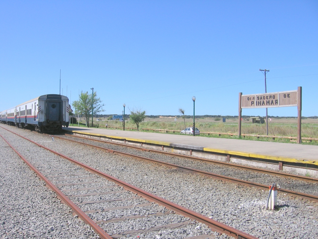 Estación Divisadero de Pinamar en el partido de General Madariaga, provincia de Buenos Aires, Argentina.